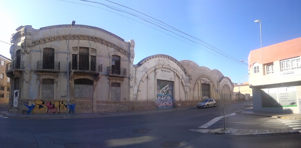 Fábrica siderúrgica construida por los arquitectos José Sáez de Tejada en 1892 y Víctor Beltrí en 1918, en el barrio de Peral de la ciudad española de Cartagena